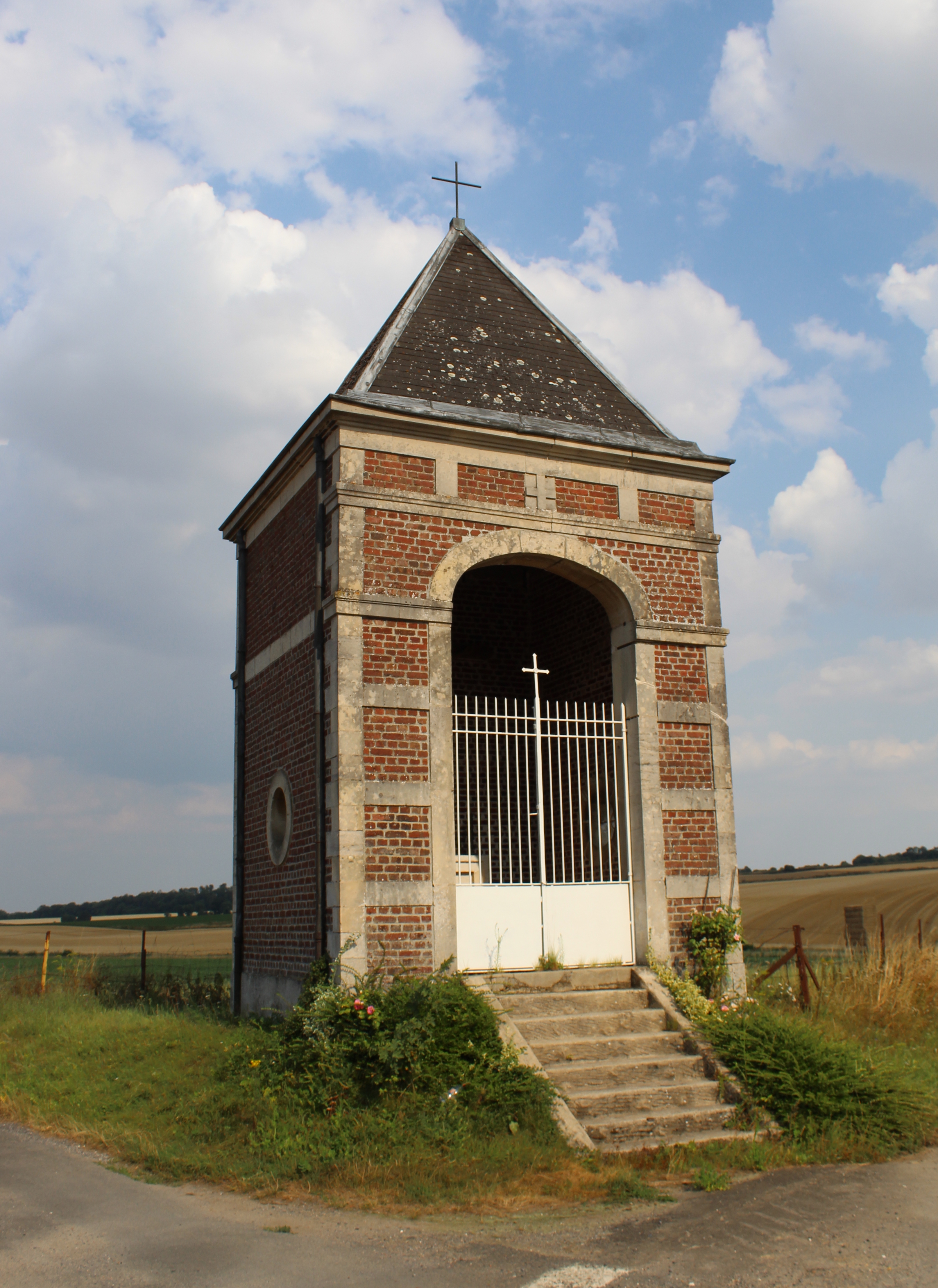 Une chapelle